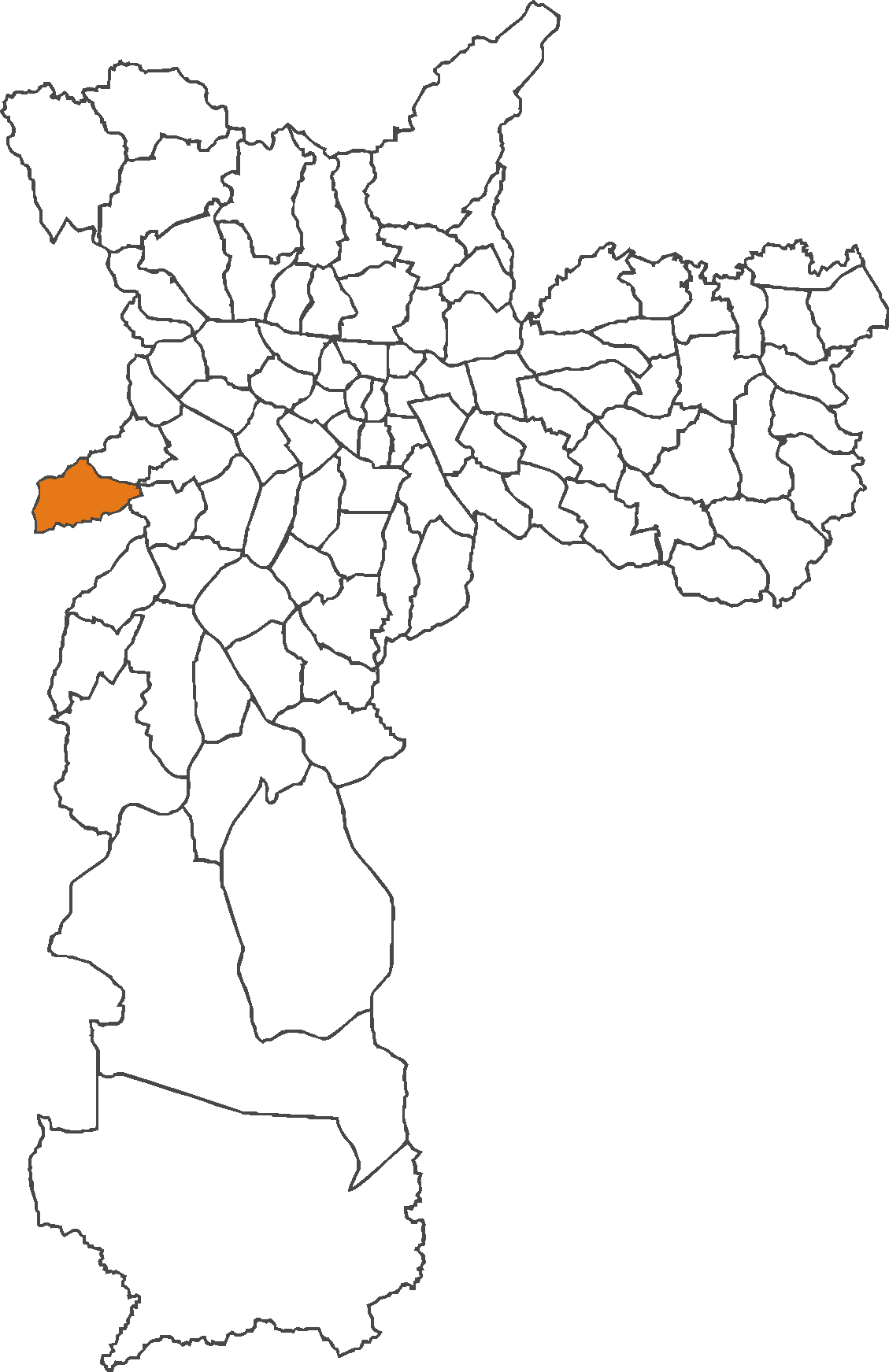 Localização do distrito de Raposo Tavares no município de São Paulo.